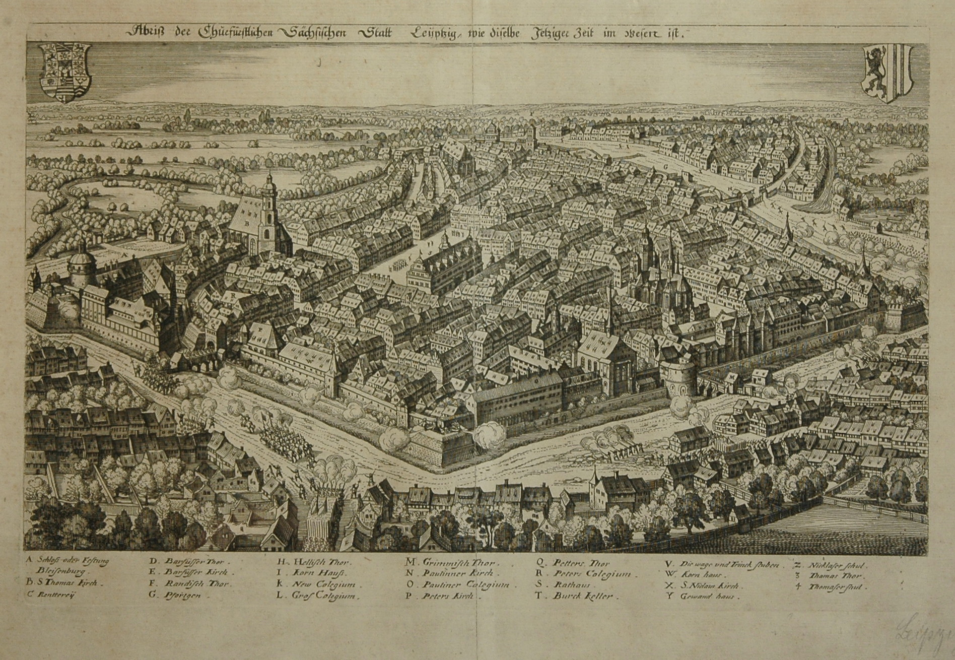 Kupferstich 20,5 x 32cm aus Theatrum Europaeum, Bd.II (1637), Ansicht aus Südost.